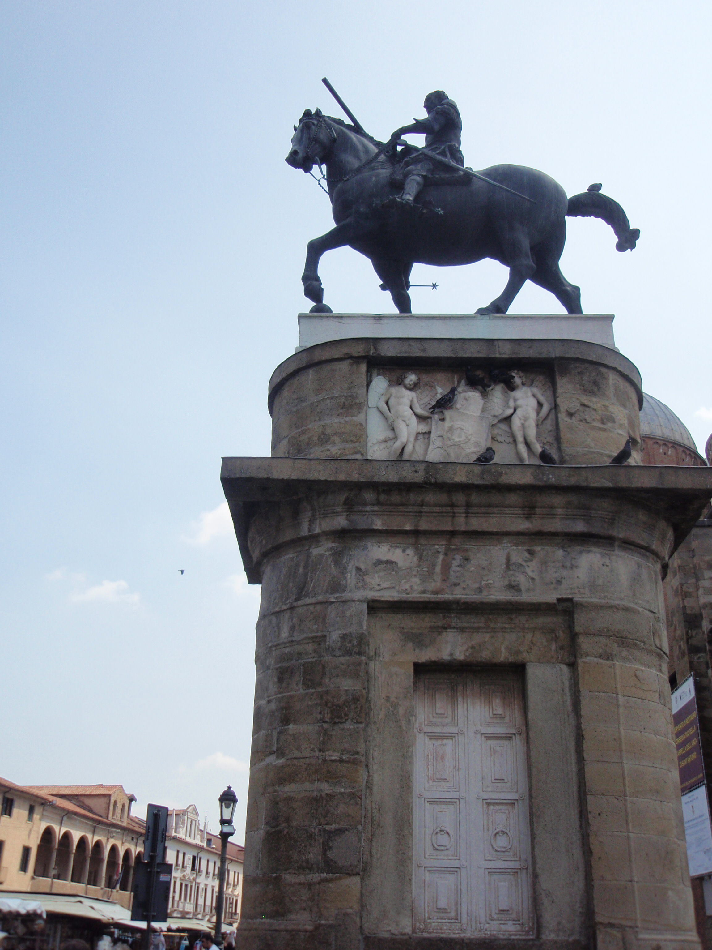 Donatello: Gattamelata lovasszobra Padovában